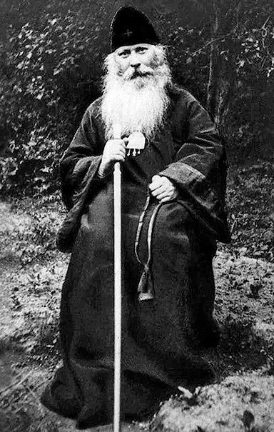 Епископ Серафим (Звездинский)